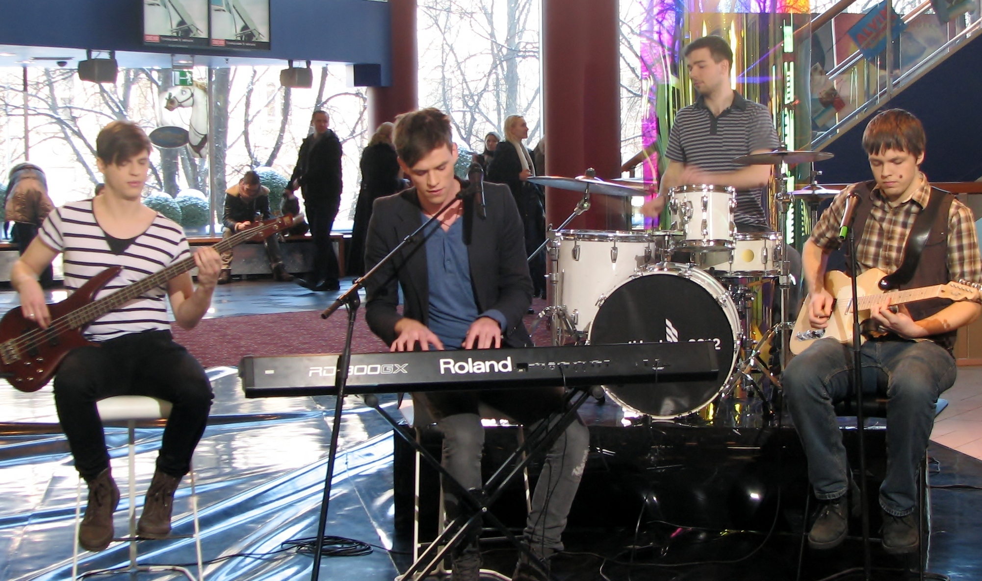 Tenfold Rabbit Ringvaate Eesti Laulu salvestusel